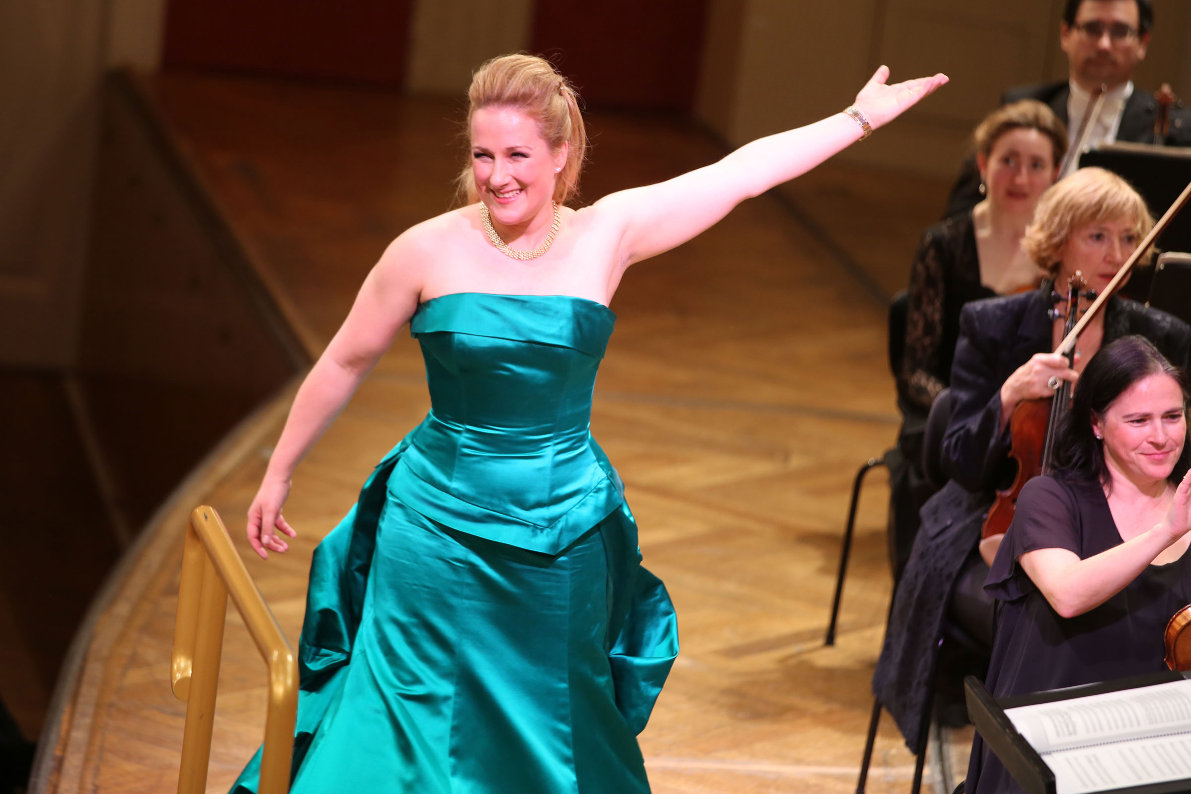 Diana Damra, Sopran